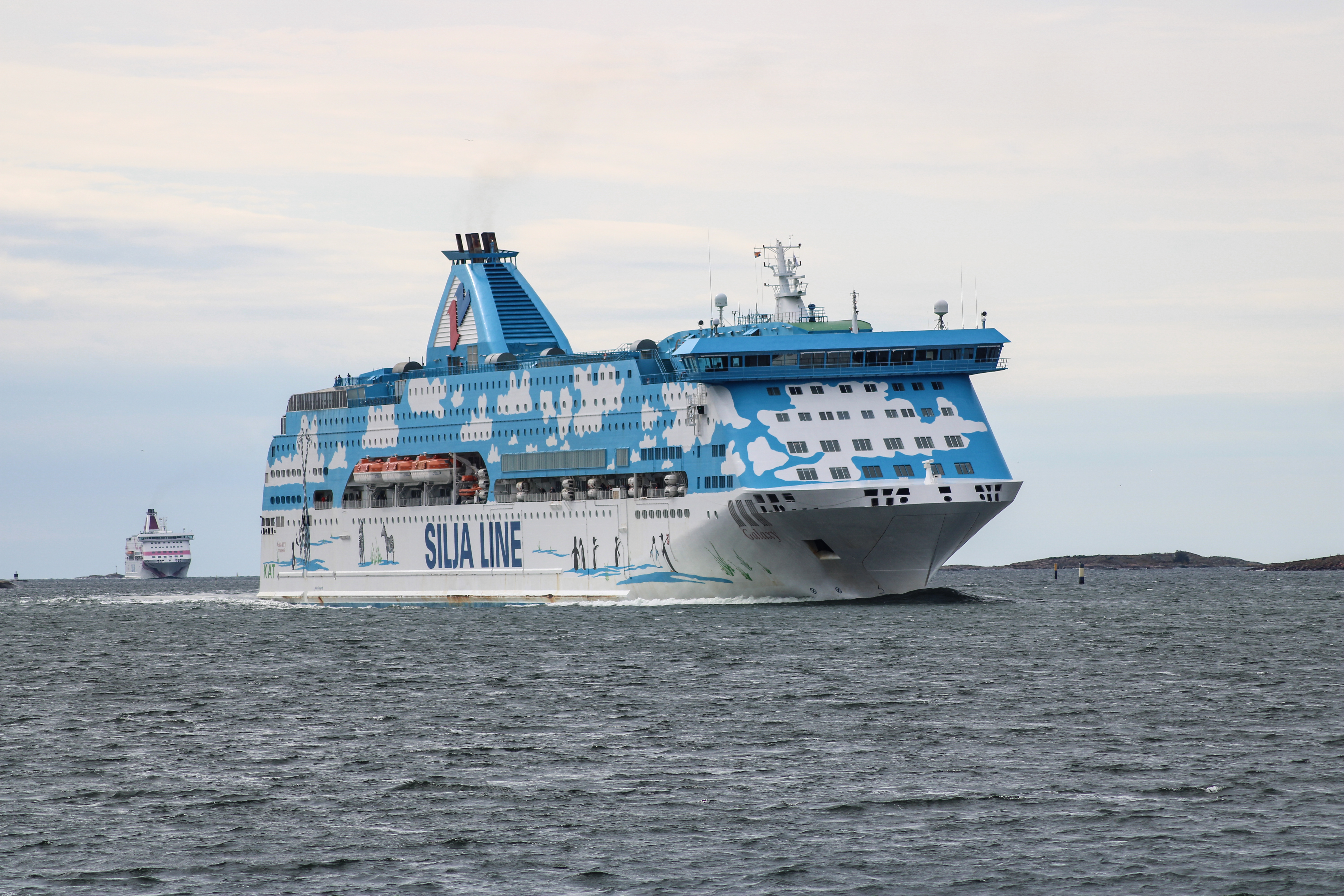 M/S Galaxy utanför Mariehamn